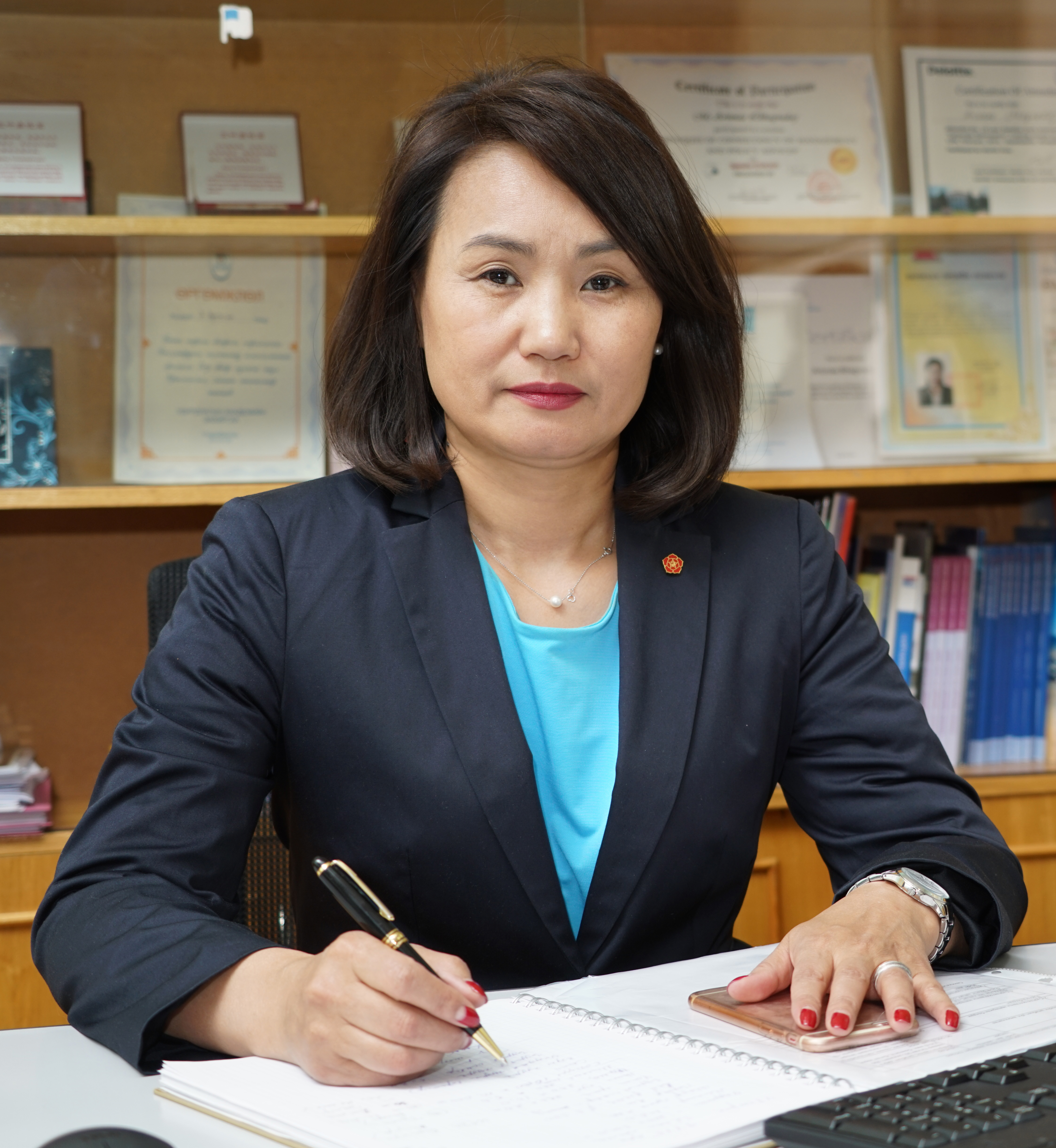 Монгол: Эдийн засгийн тэнхимд хичээлийн өмнө